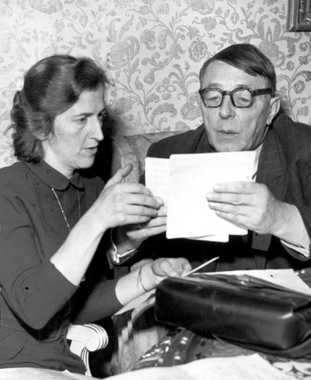 Doktor Margit Sahlin och biskop Arne Fjellbu studerar det nya förslaget.